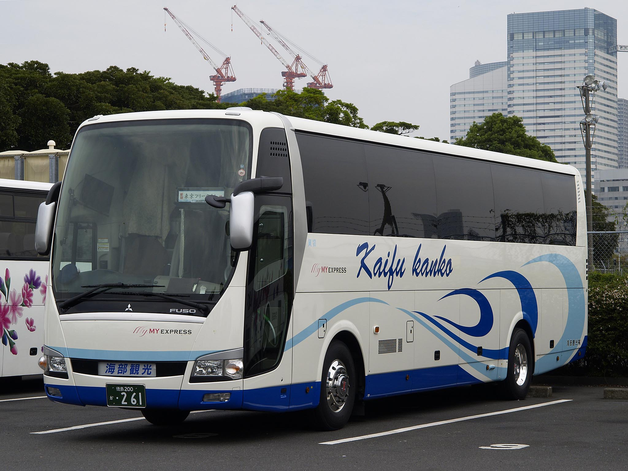 海部観光の高速ツアーバス「マイエクスプレス」専用車。 型式：三菱ふそう・エアロクイーン BKG-MS96JP 登録番号：徳島200か・261 撮影地：東京都中央区・晴海埠頭客船ターミナル付近